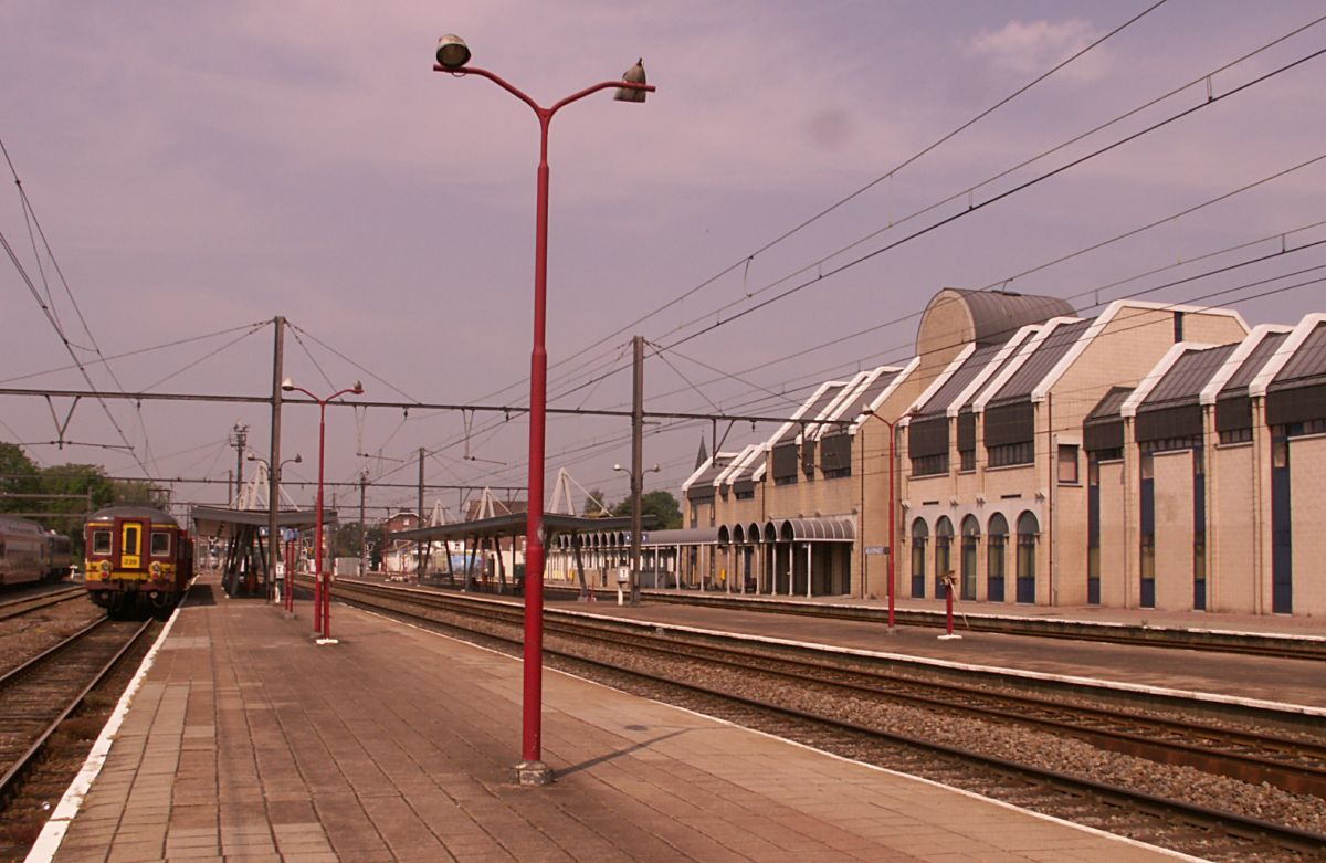 Ligne 37, Gare de Welkenrath